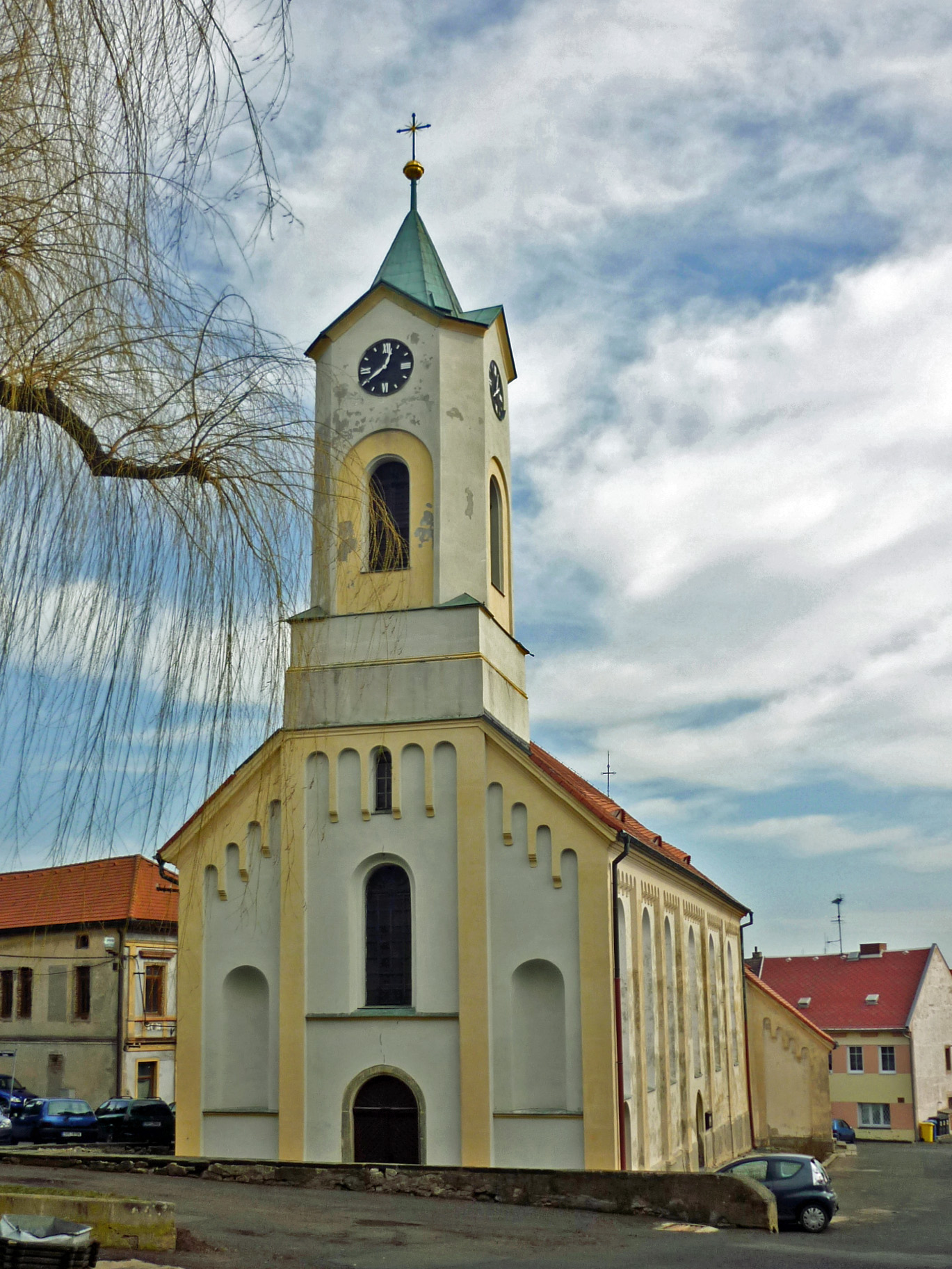 Katharinenkirche in Klostergrab (Hrob)